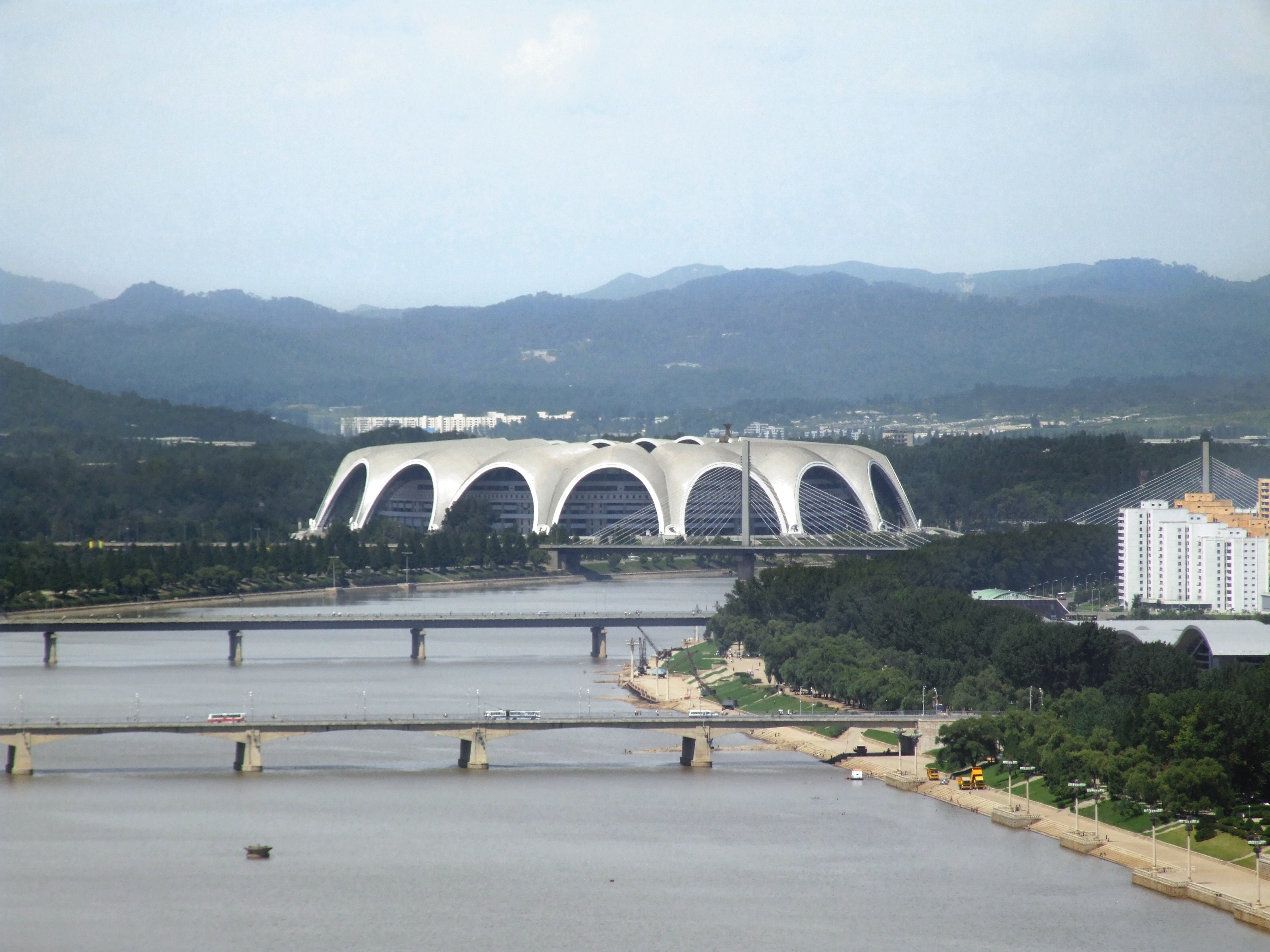 Blick vom Yanggakdo International Hotel